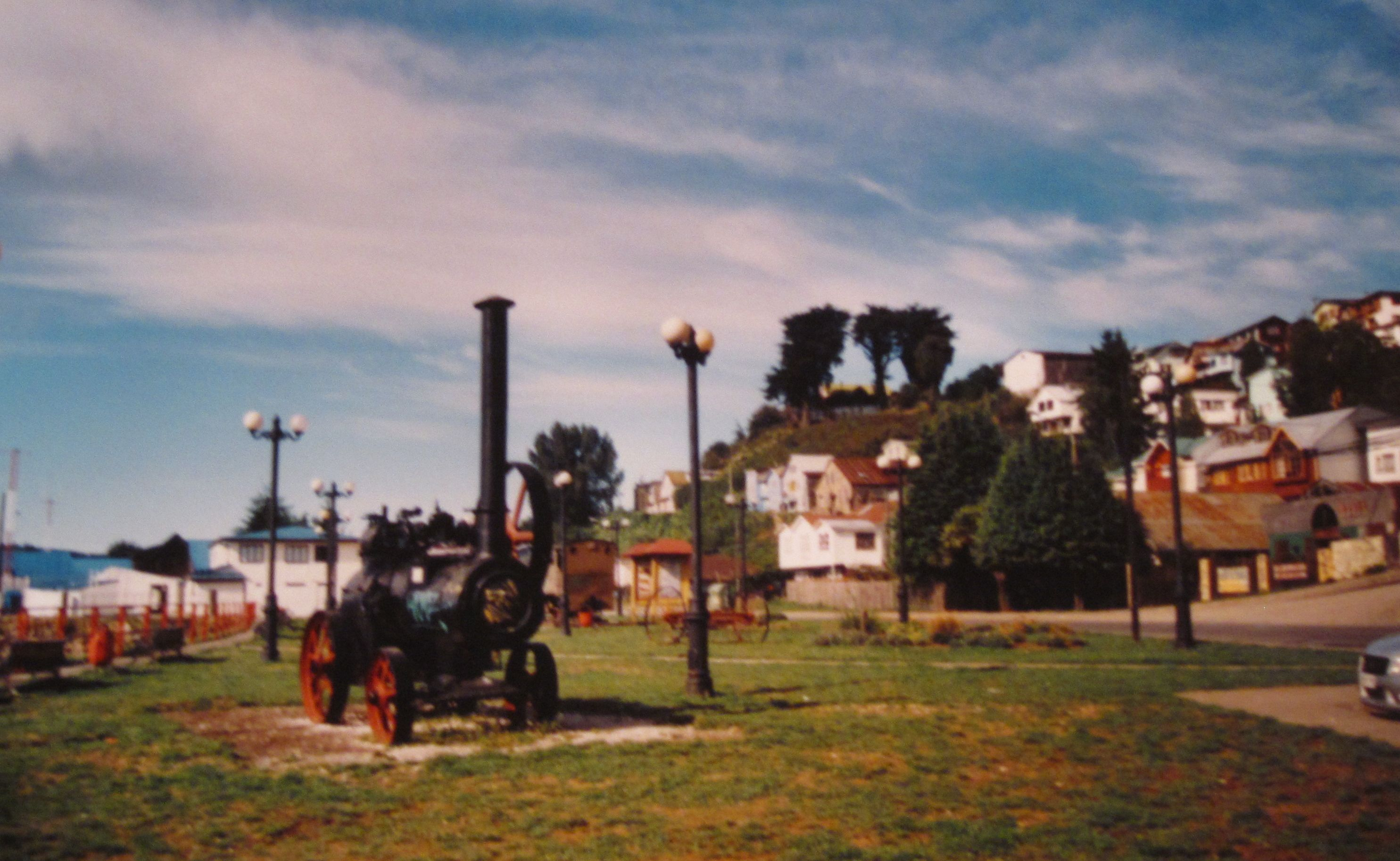 Locomóvil en la Plaza del Tren, Castro, Isla de Chiloé, Chile